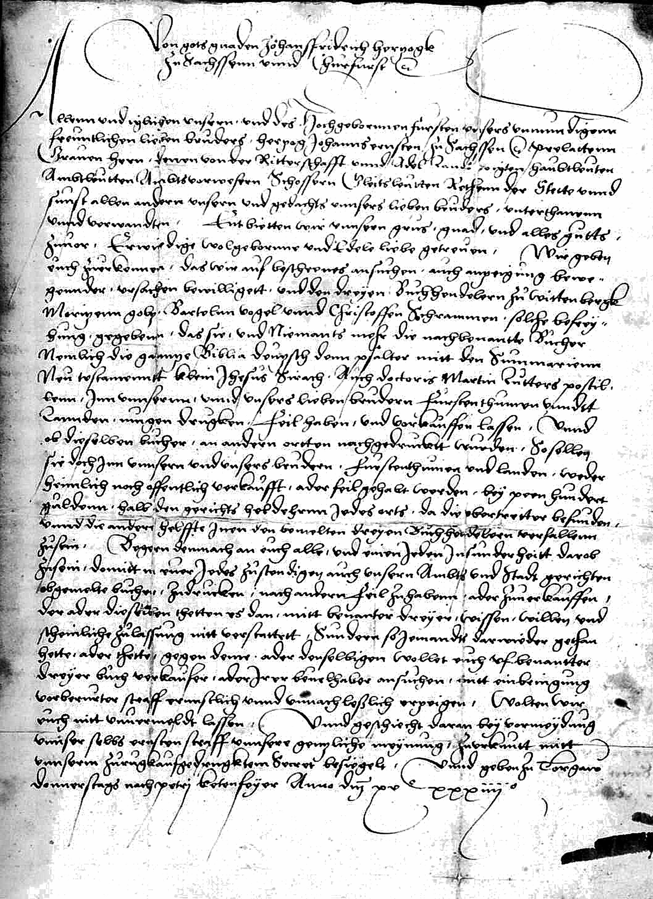 Privileg von Kurfürst Johann Friedrich von Sachsen für Moritz Goltz(e), Christoph Schramm und Bartholomäus Vogel zur Publikation der ersten Gesamtausgabe der Luther-Bibel, Torgau 6. August 1534; handschriftliche Ausfertigung. Aus: Mark Lehmstedt: Geschichte des deutschen Buchwesens in Bildern. Geschichte des deutschen Buchwesens, S. 8660